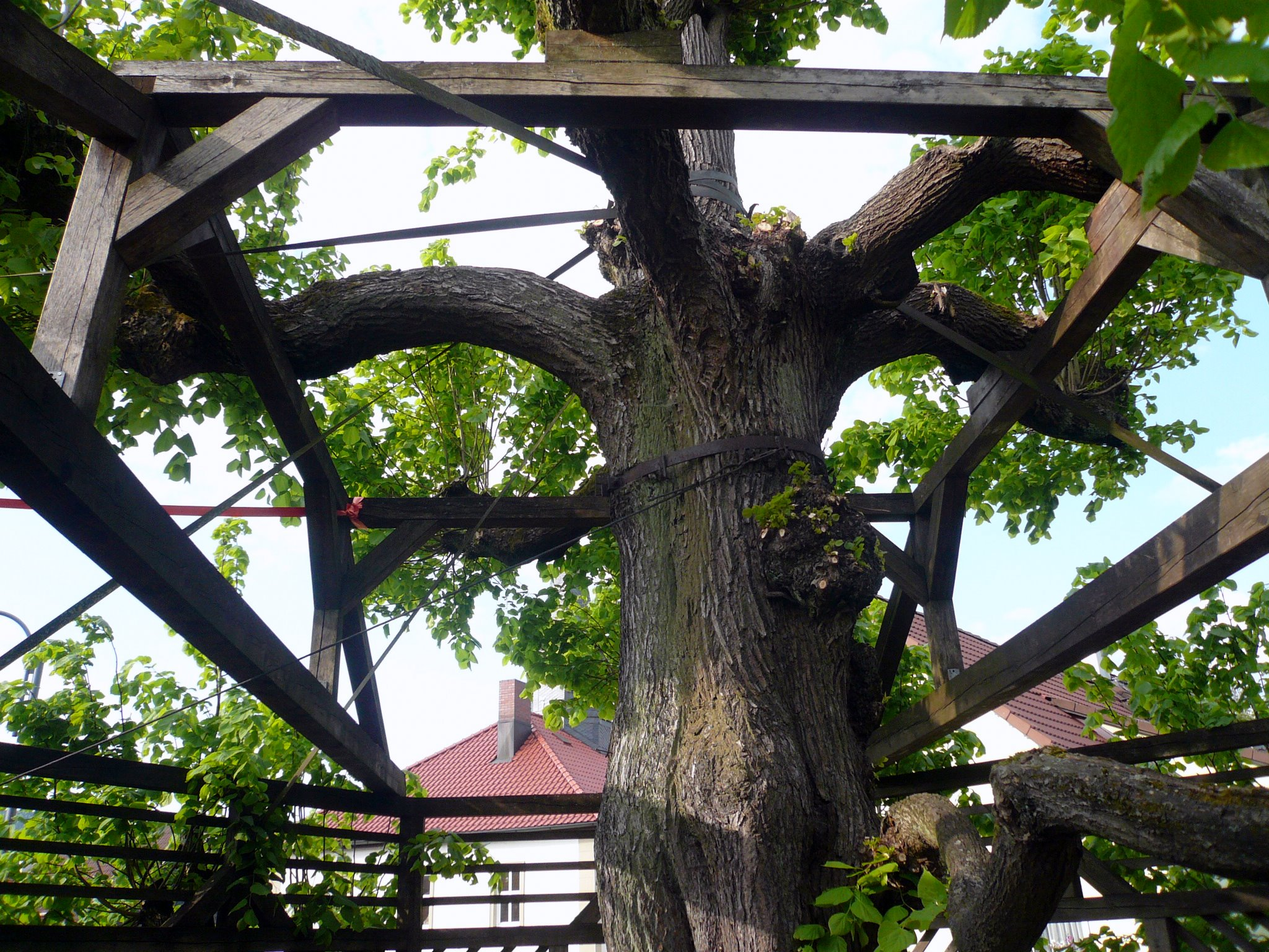 Tanzlinde in Sachsenbrunn